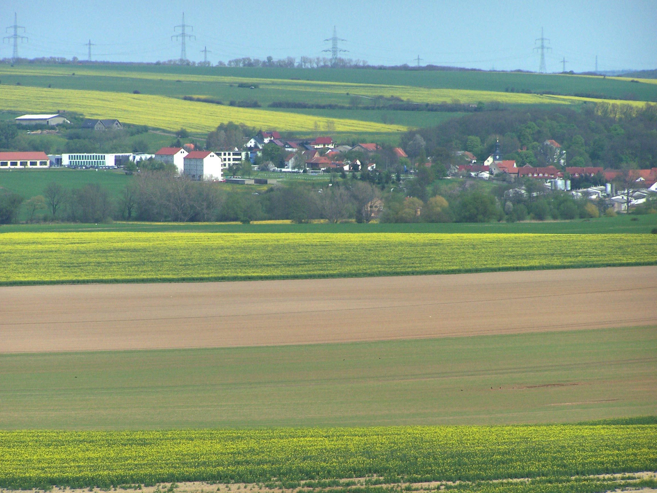 Wenigenlupnitz, Ansicht von Westen (Leimenberg)